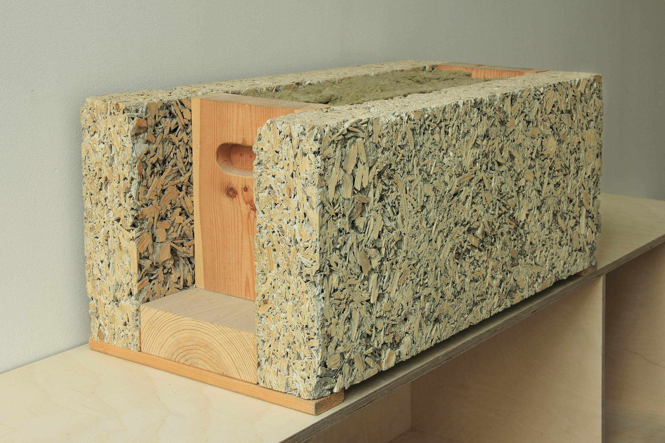 Muster: Holzbeton mit dazwischen liegenden Dämmmaterial